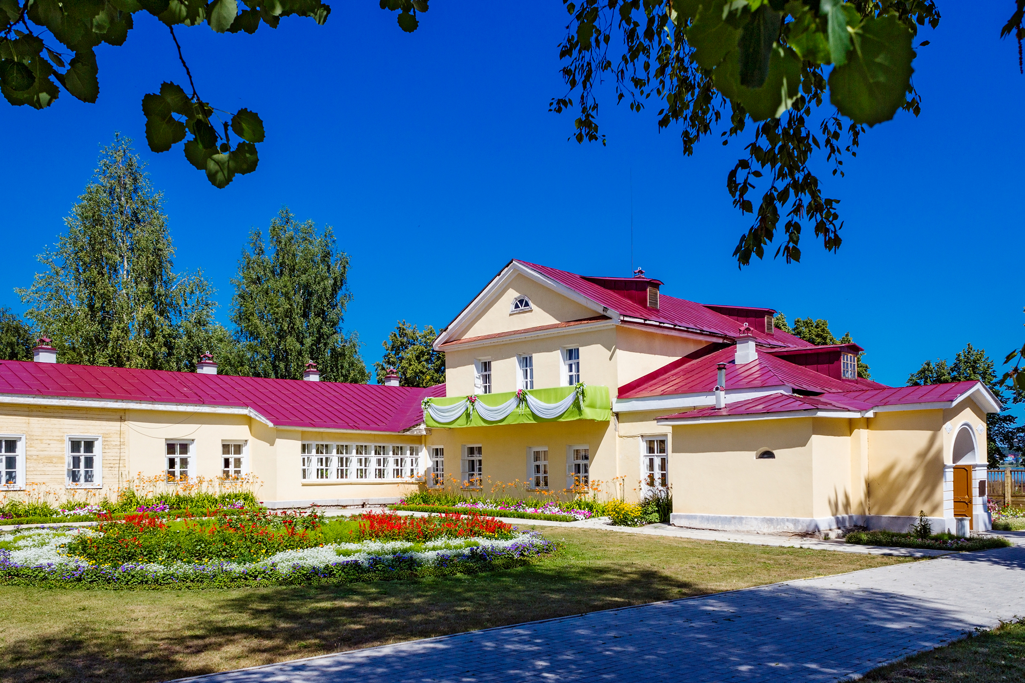 Дом горного начальника (дом, в котором родился П.И. Чайковский в 1840 году): улица Чайковского, 119, Воткинск, Удмуртия